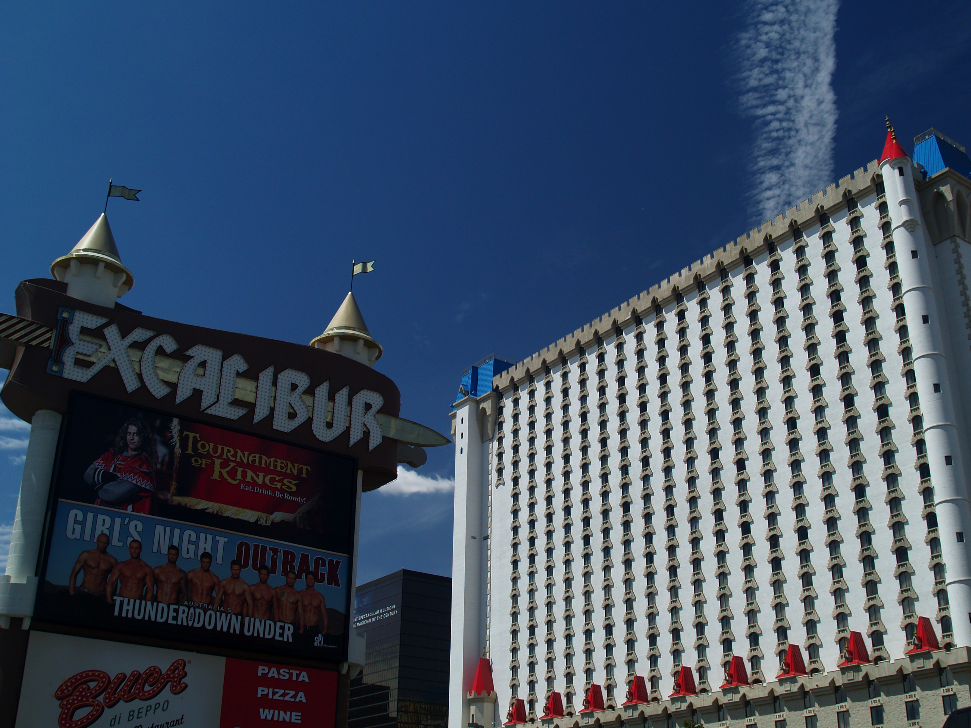 Las Vegas. Hotel Excalibur.